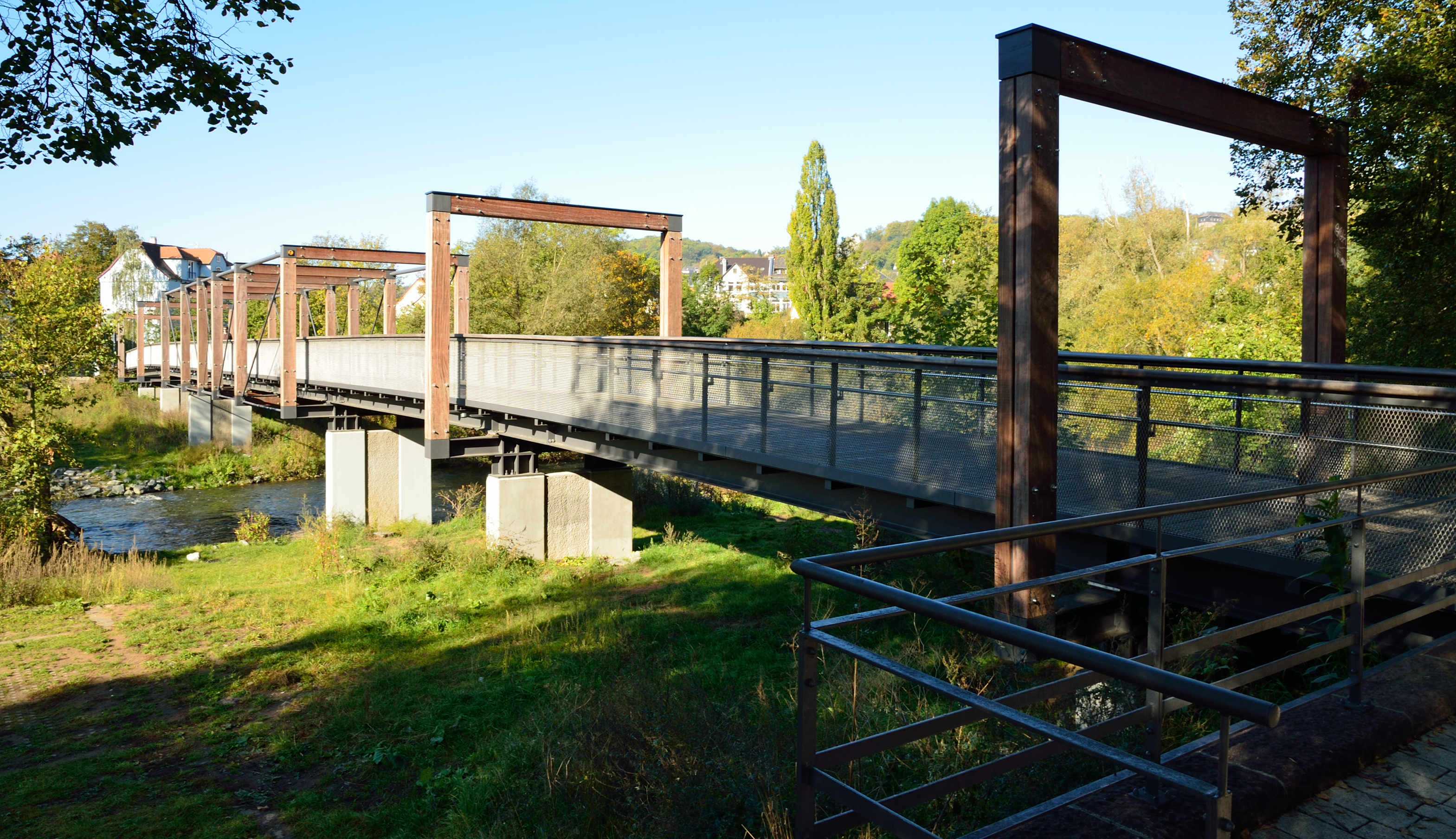 Der neue Hirsefeldsteg (erbaut 2010) in Marburg